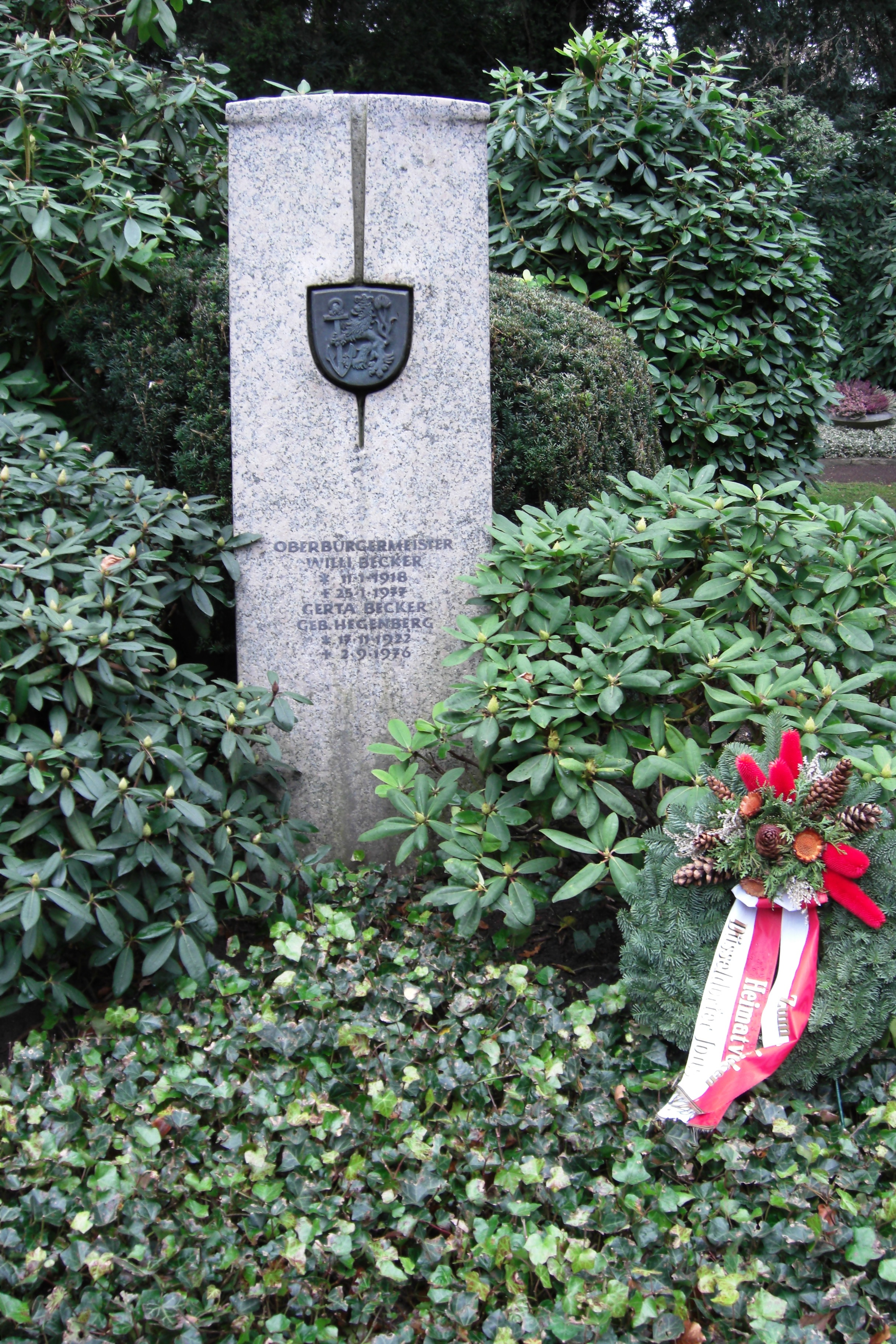 Grab des SPD-Politikers Willi Becker (1918-1977) auf dem Düsseldorfer Nordfriedhof